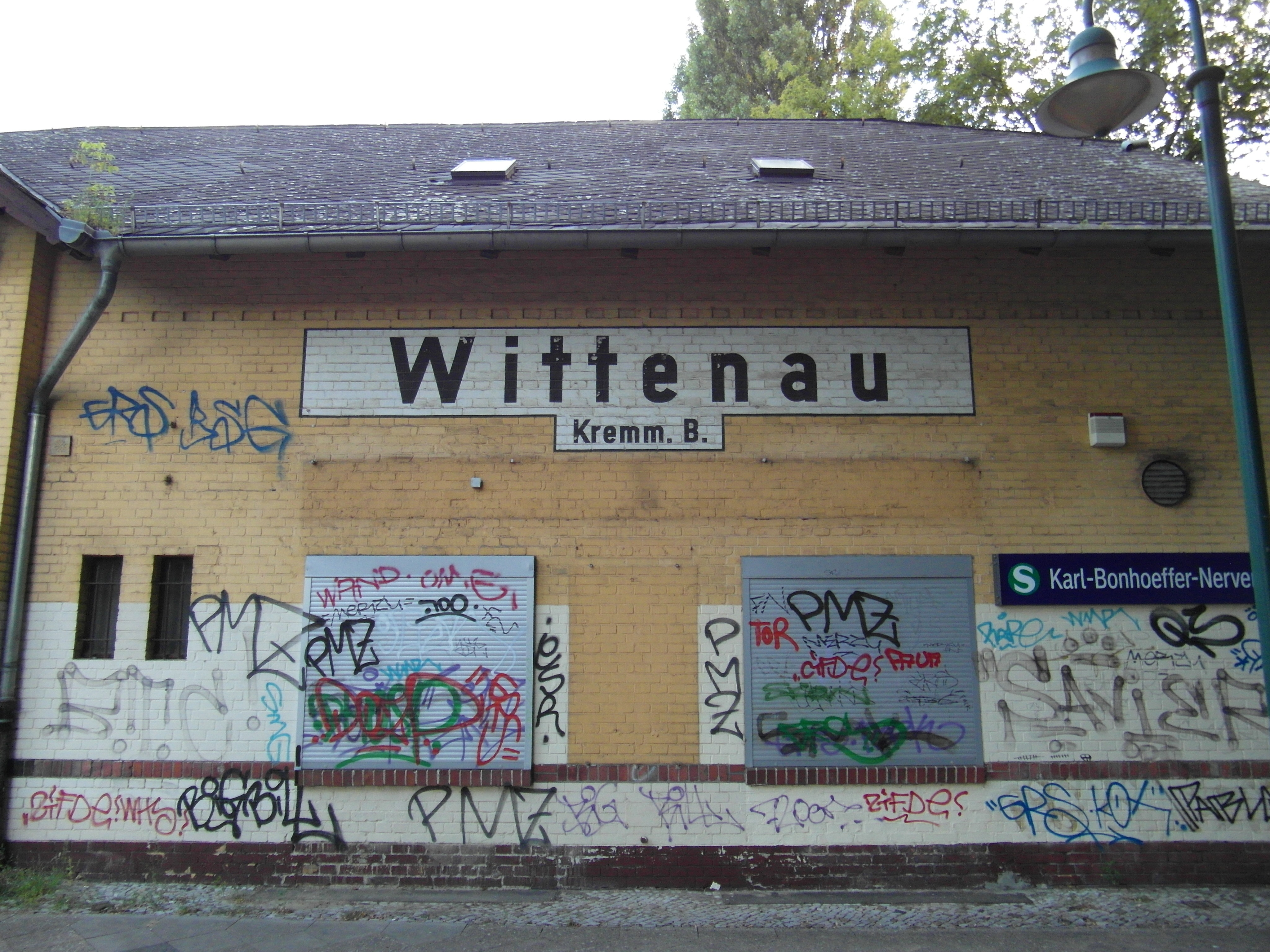 Linie S25